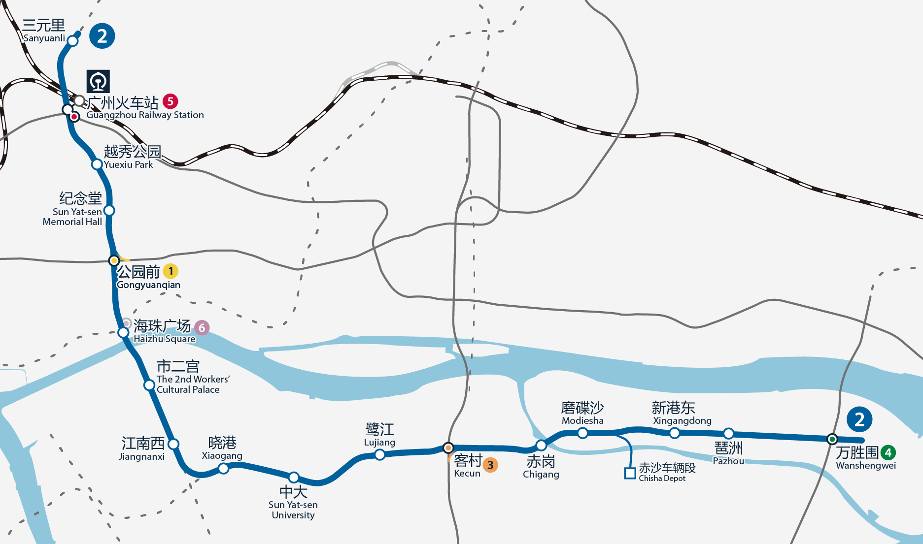 廣州地鐵舊2號線路線圖（拆解前），按真實走向比例繪畫